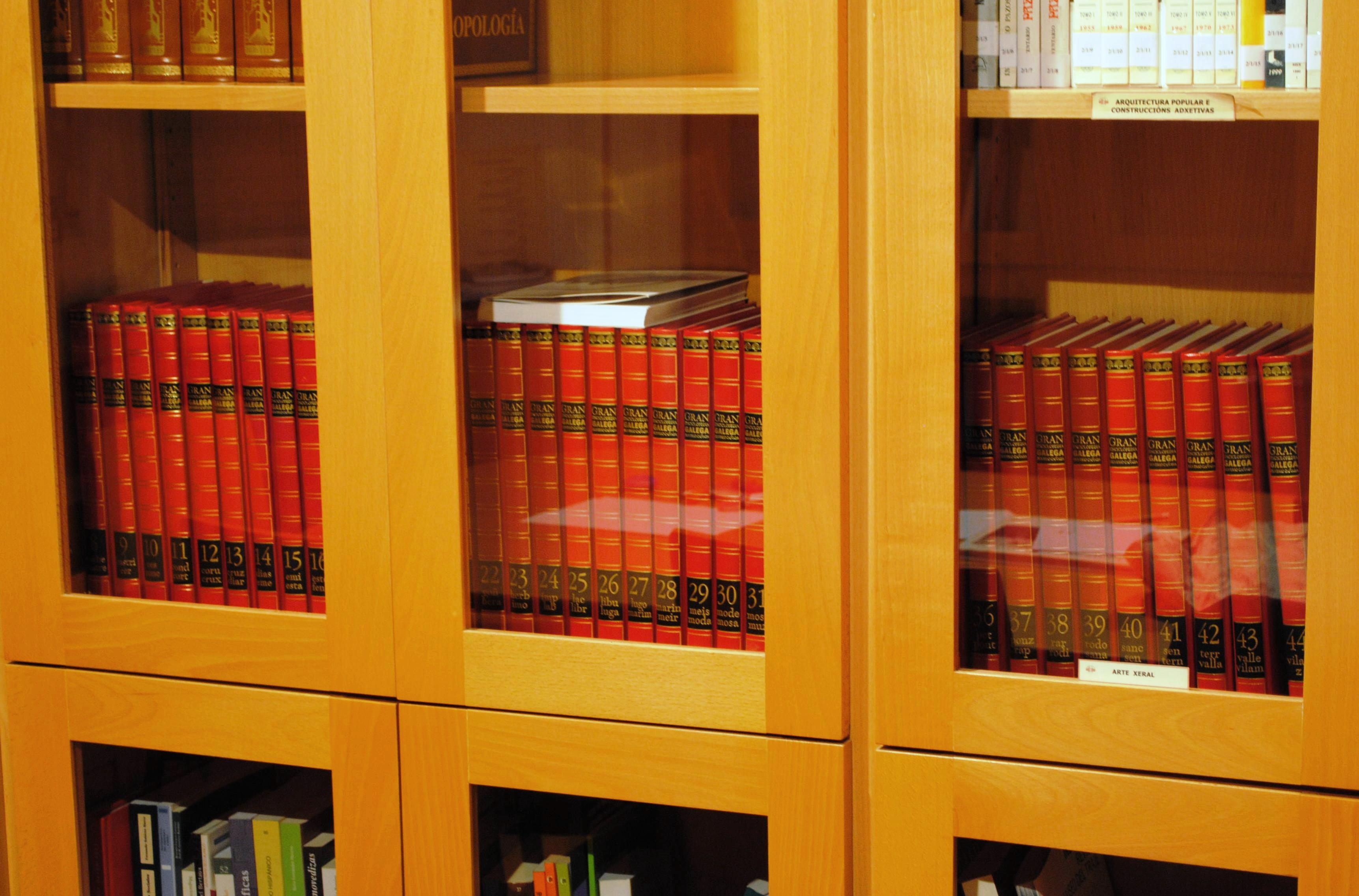 Vexa o título e as categorías.